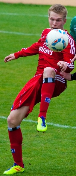 Janek Sternberg im Einsatz für den HSV beim Testspiel gegen den MSV Pampow am 24. April 2012